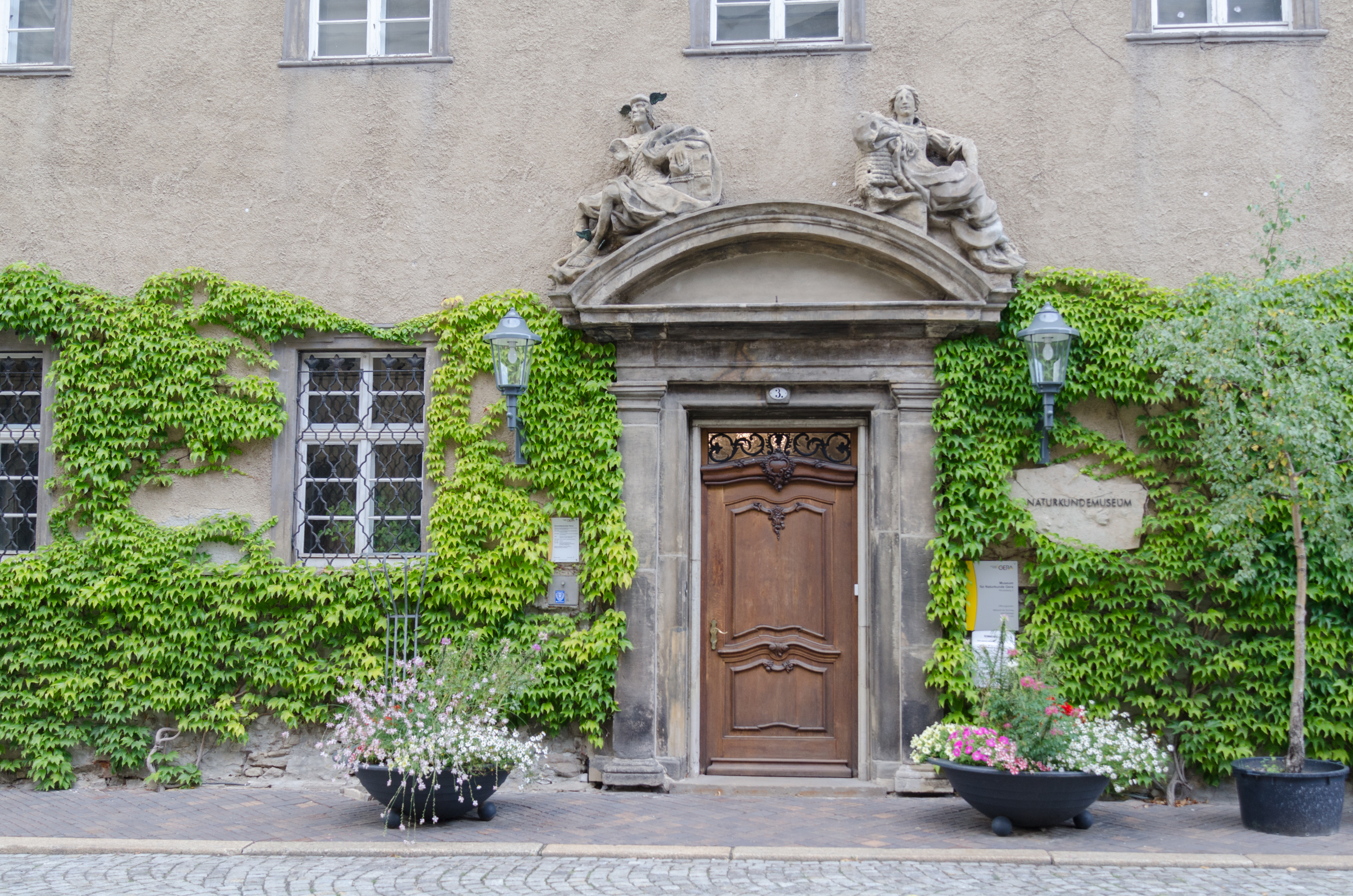 Gera, Nicolaiberg 3